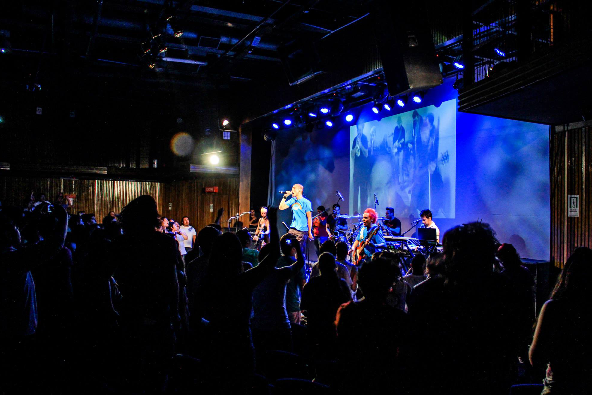 Papanegro en la SCD Vespucio